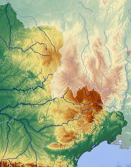 Carte topographique du Massif Central, le Grand Sud-Ouest français étant en surbrillance